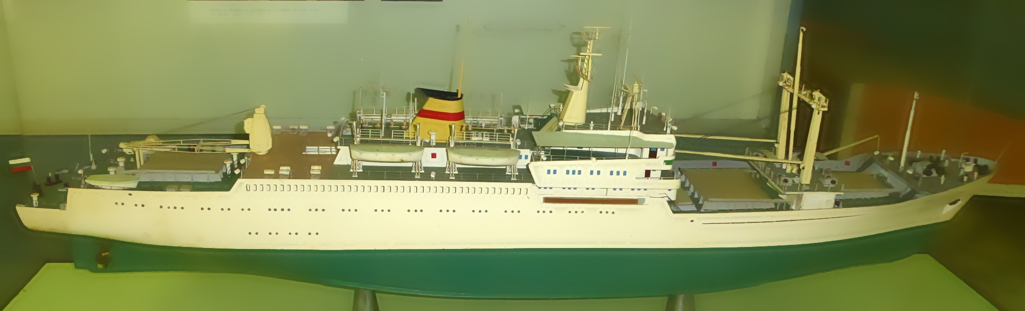 Schul- und Handelsschiff IMO 7500827